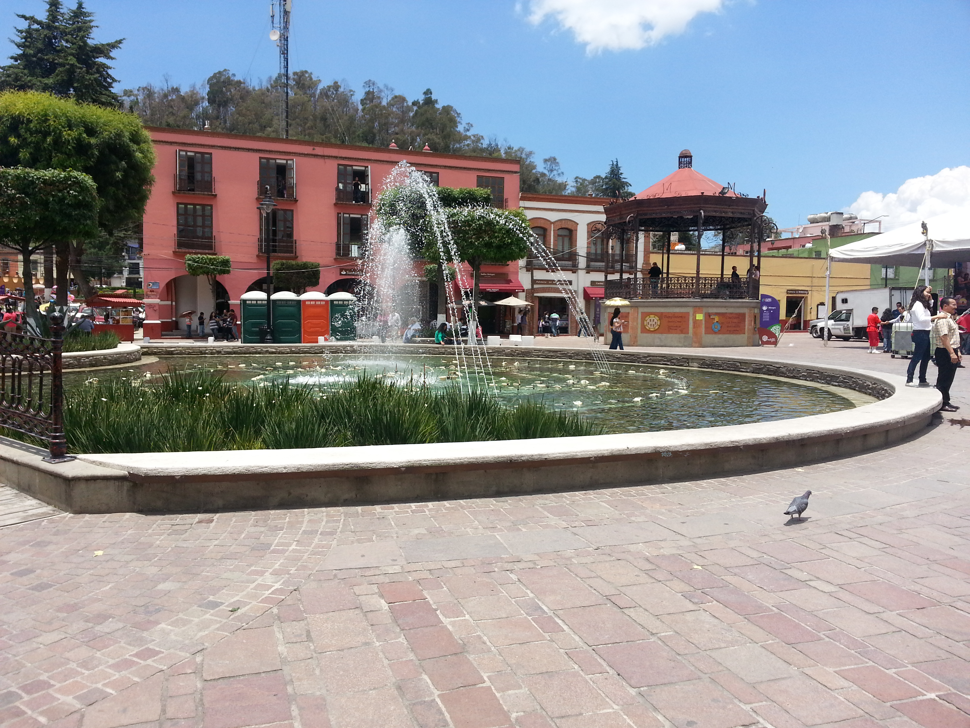 Plaza Principal del municipio de Metepec, con la fuente.Metepec,Estado de México,México.